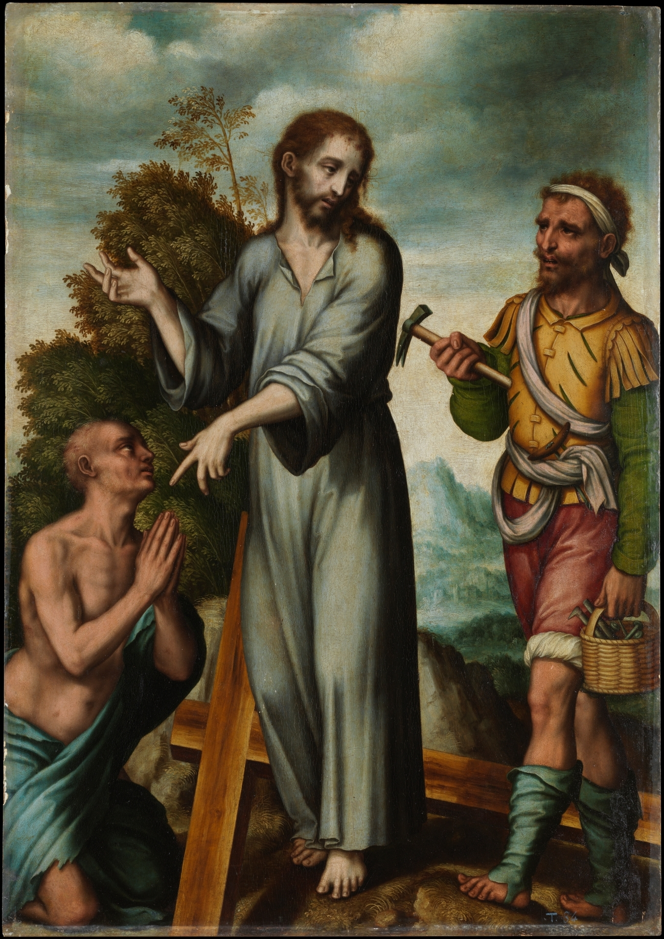 La obra representa a Jesucristo, en el momento en que iba a ser crucificado, vestido probablemente con el sudario y acompañado por dos personajes, siendo uno de ellos el verdugo que lleva las herramientas necesarias para la crucifixión y el otro un penitente que observa a Cristo y a quien este último señala con el dedo, al tiempo que la cruz donde sería crucificado Jesús aparece depositada en el suelo.